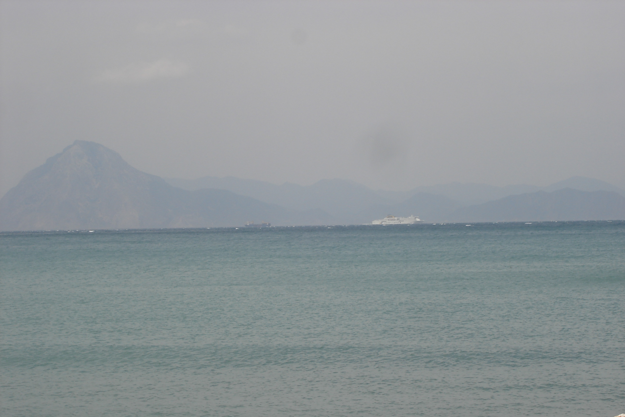 Patraikos gulf, Ionian sea, Patra, Achaea, GreeceΠατραϊκός Κόλπος